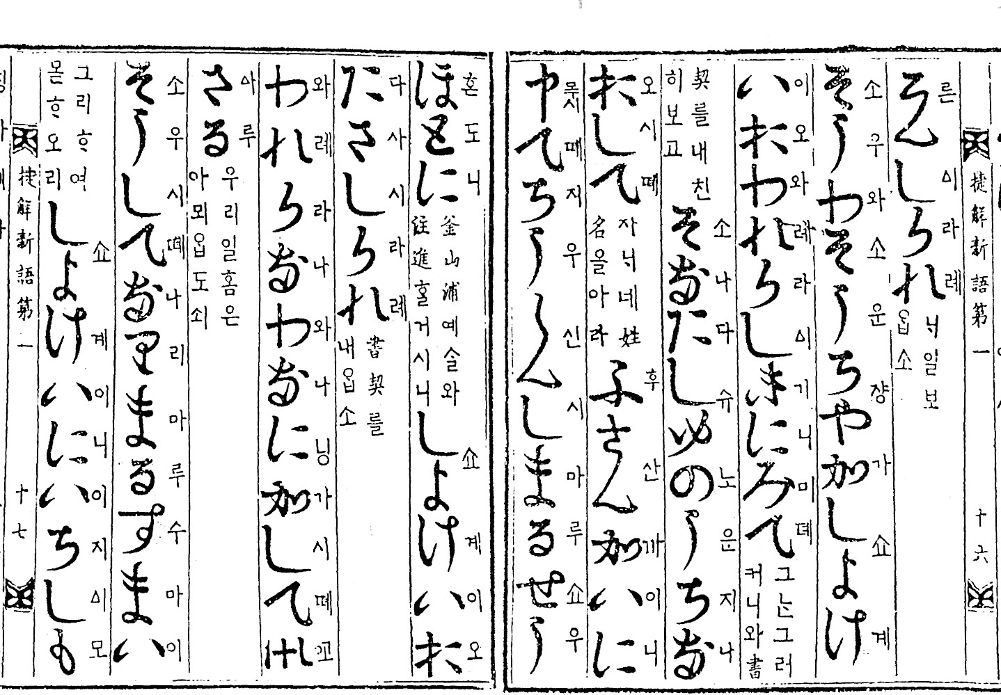 『捷解新語 本文・国語索引・解題』京都大学国語国文学会、1957年。のコピーをスキャンし、更につぎはぎ等の加工。